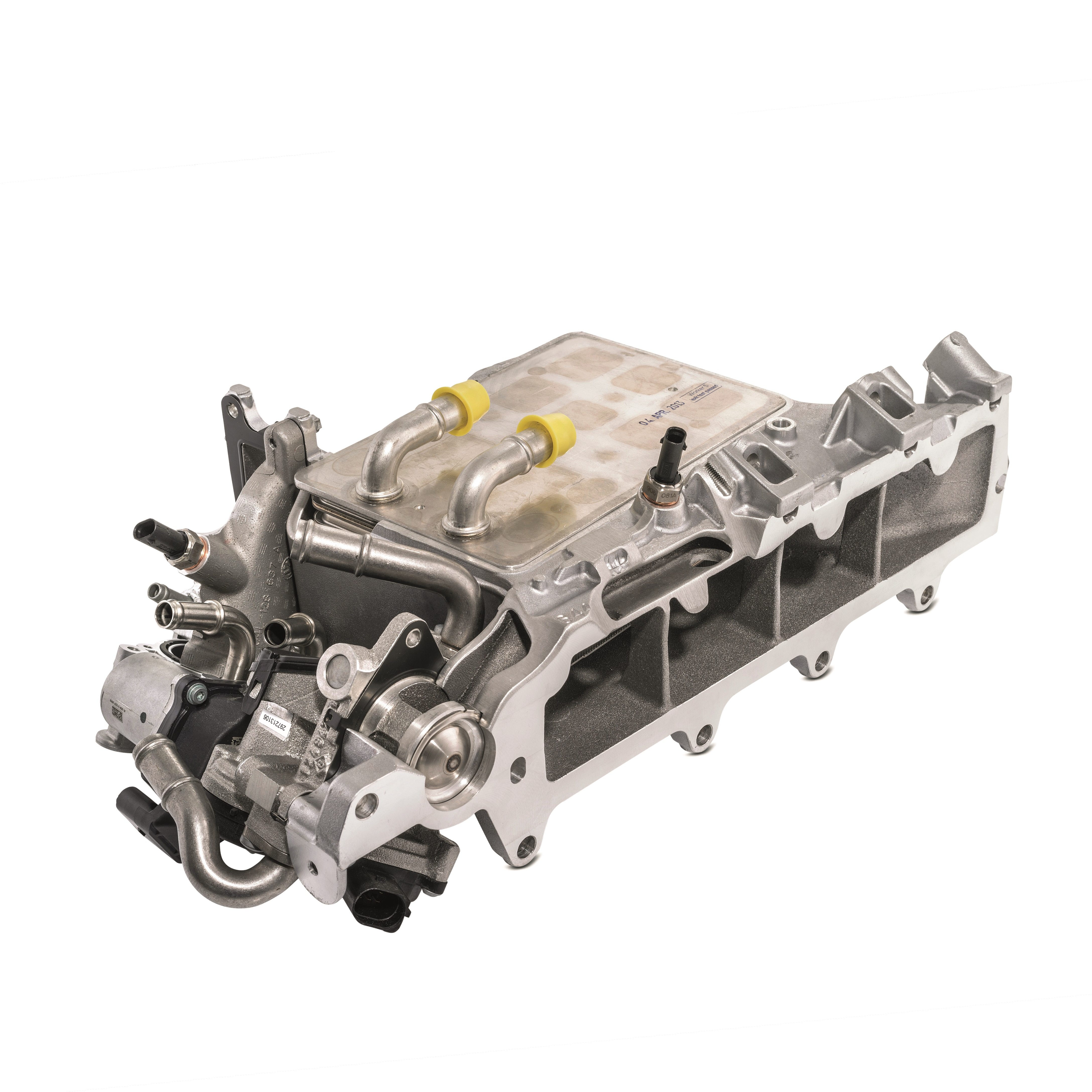 Ein Saugmodul mit integrierter Ladeluftkühlung.